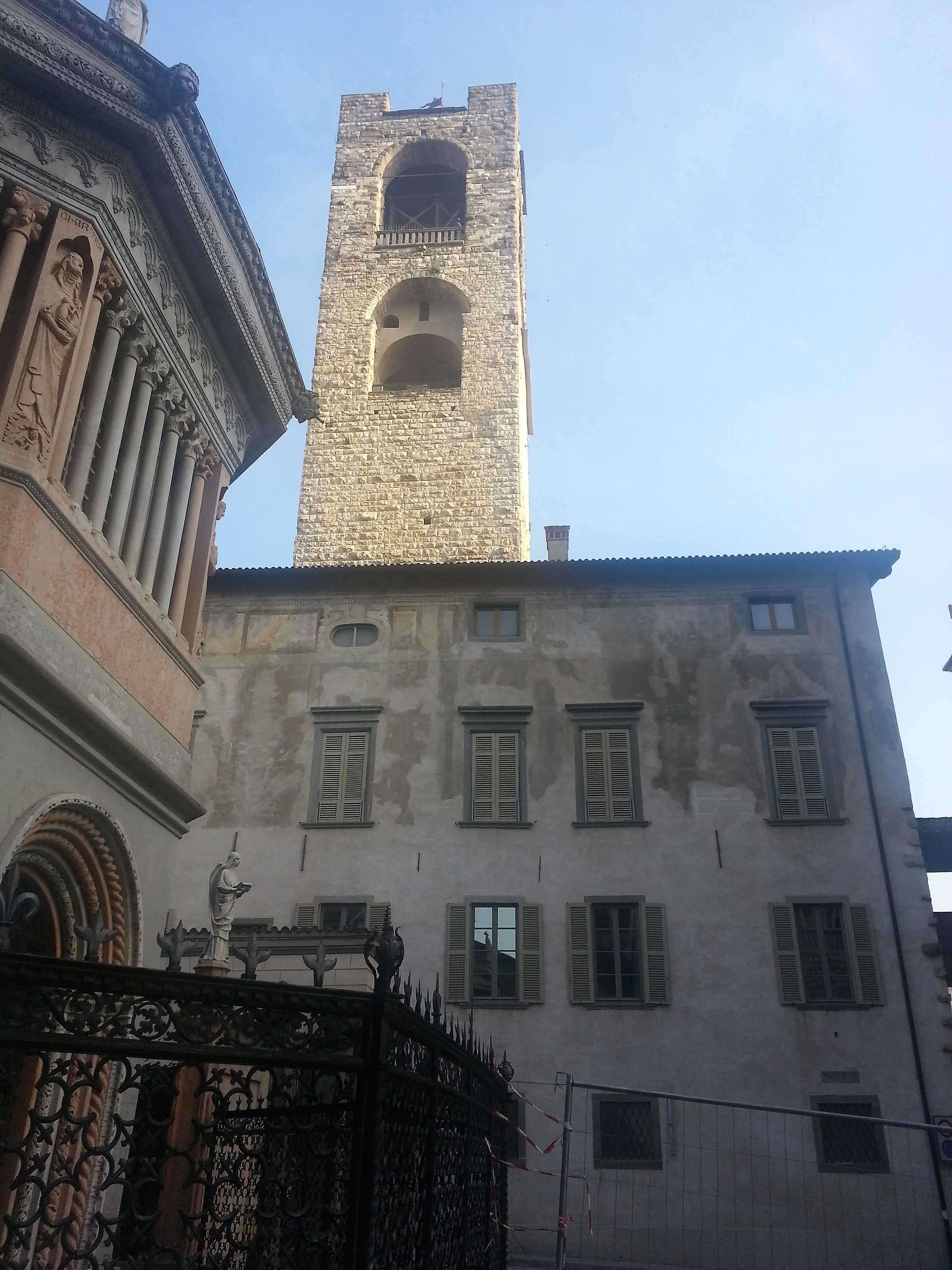 Palazzo del Podestà lato detto dei Giuristi